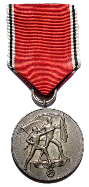 German Anchluss medal